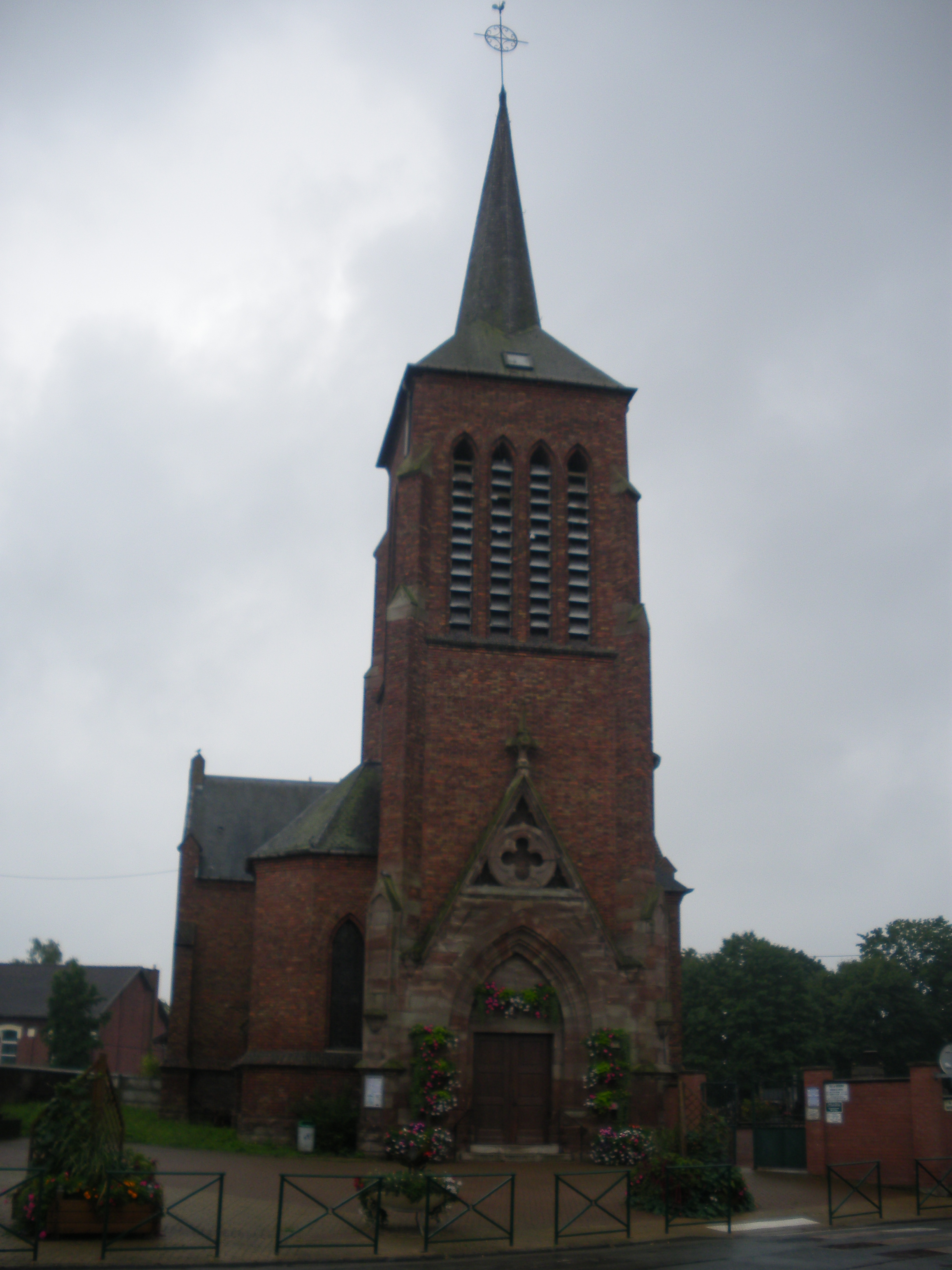 Vue de l'église de Meurchin.